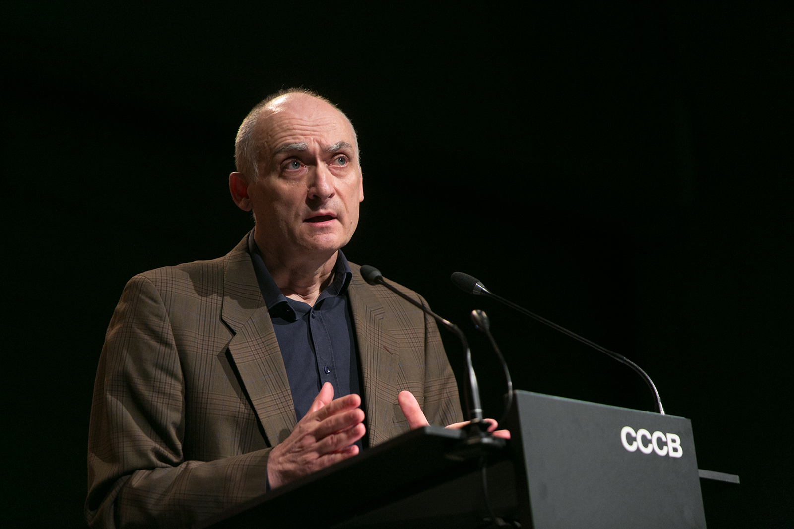 Josep Maria Esquirol Calaf al CCCB el 2018